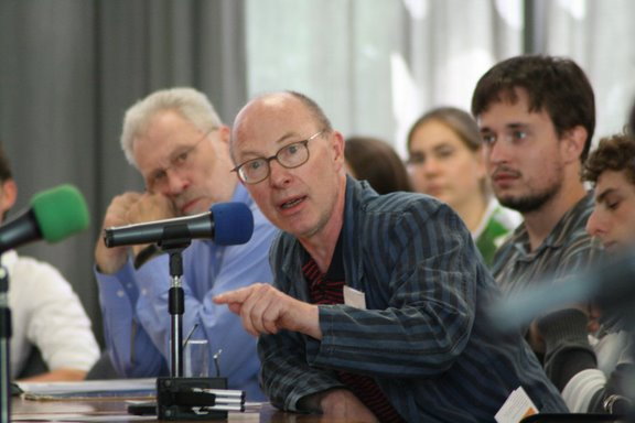 Der Wiener Philosoph Herbert Hrachovec während der Diskussion am Freitagnachmittag